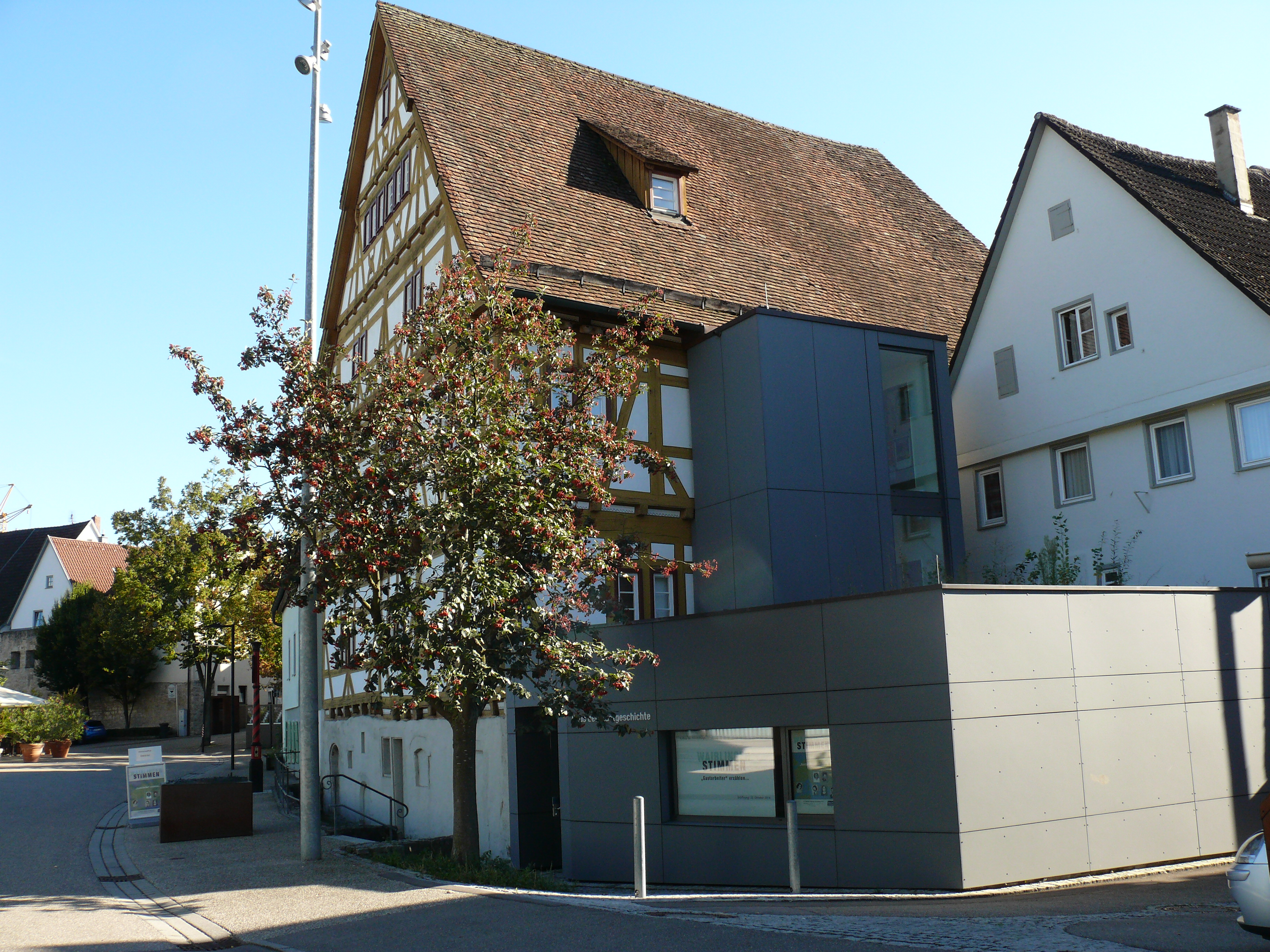 Das Haus der Stadtgeschichte in Waiblingen in der Weingärtner Vorstadt, gebaut um 1550.